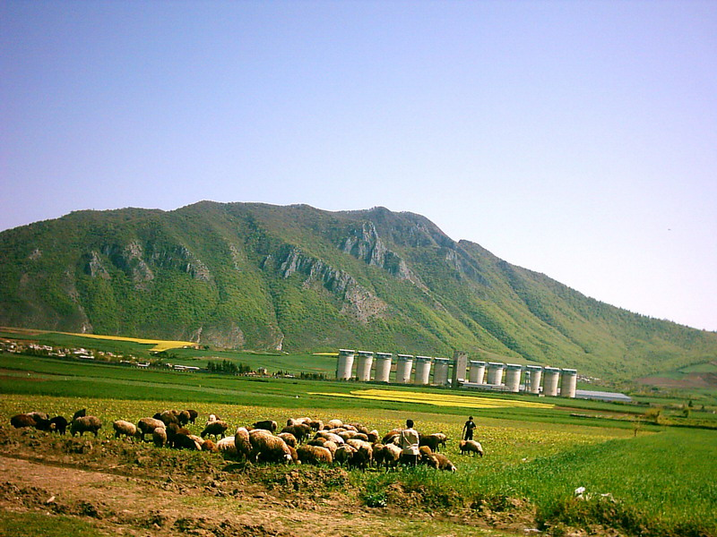 سیلوی شصت هزار تنی نگهداری گندم در حوالی روستای بلوچ آبادبعد از گالیکش، پنج کیلومتری شهر کلاله، استان گلستان، ایران